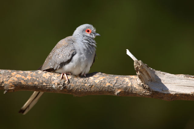 Tortola diamante en una rama